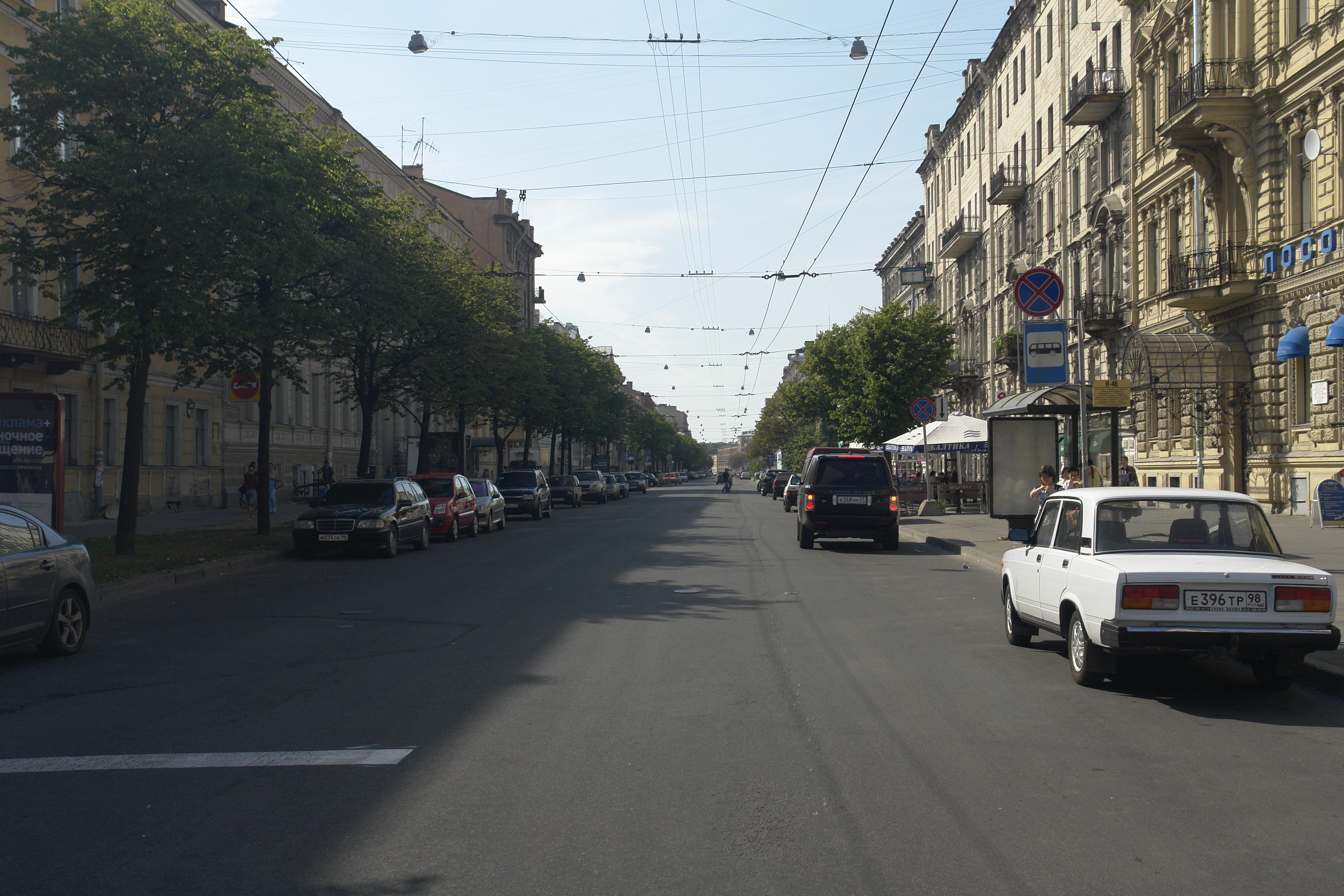 улица Чайковского (Санкт-Петербург), вид с проспекта Чернышевского в сторону Литейного проспекта.